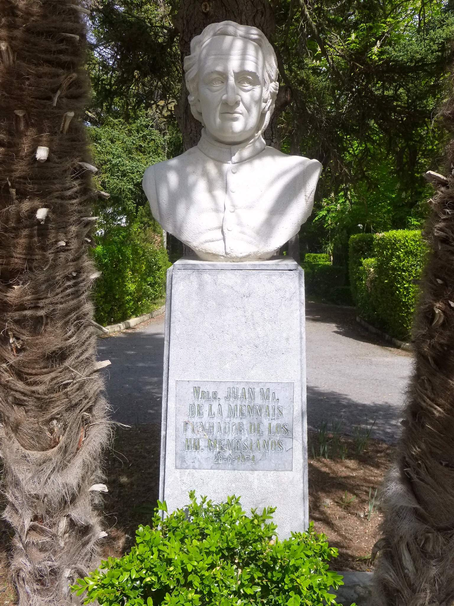 Colegio San José-Menesianos, en Nanclares de la Oca (Álava). Busto de Jean-Marie de Lamennais